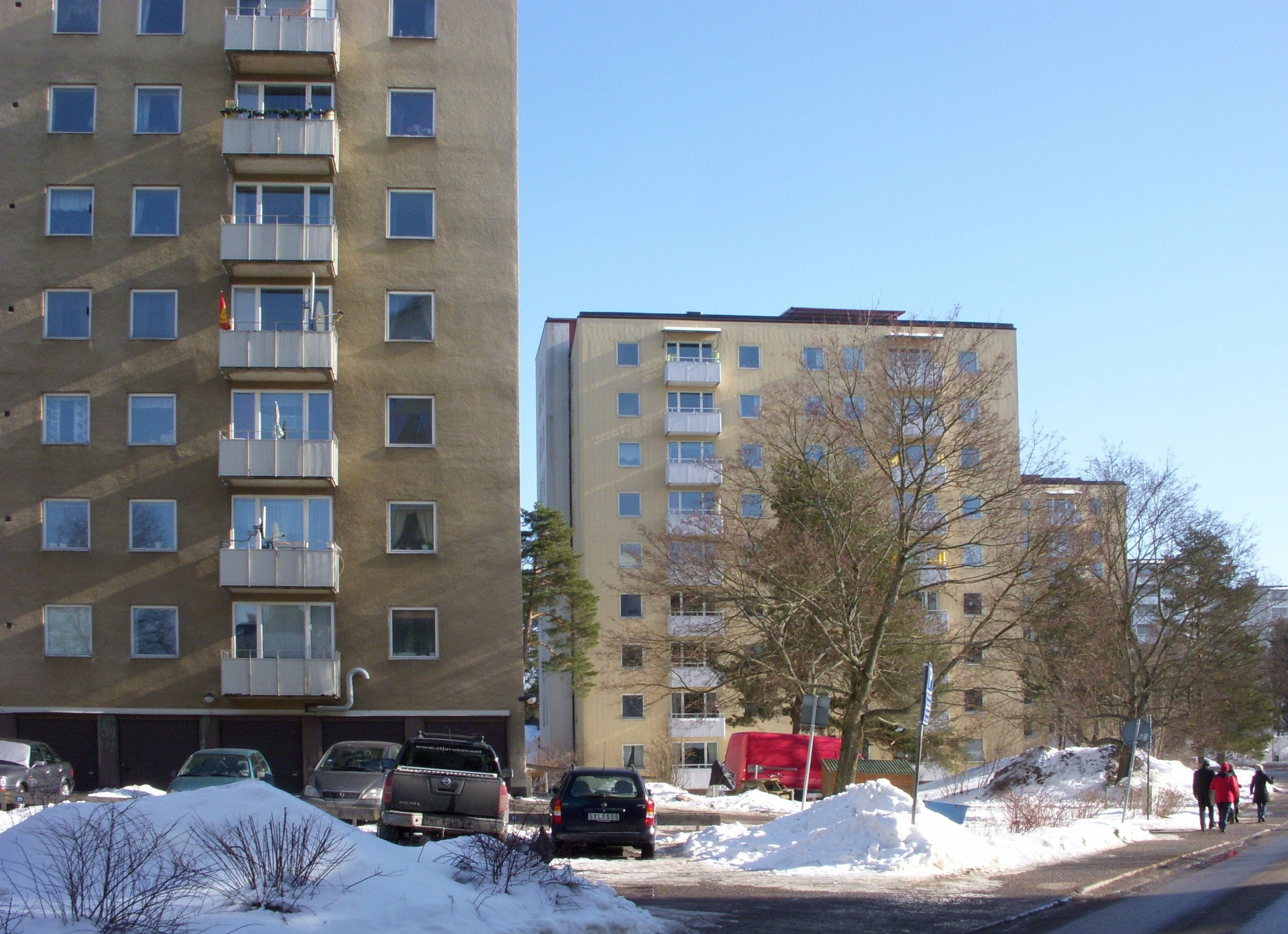 Hagsätra, södra Stockholm, äldre bostadsbebyggelse från 1960-talet längs Vintrosagatan